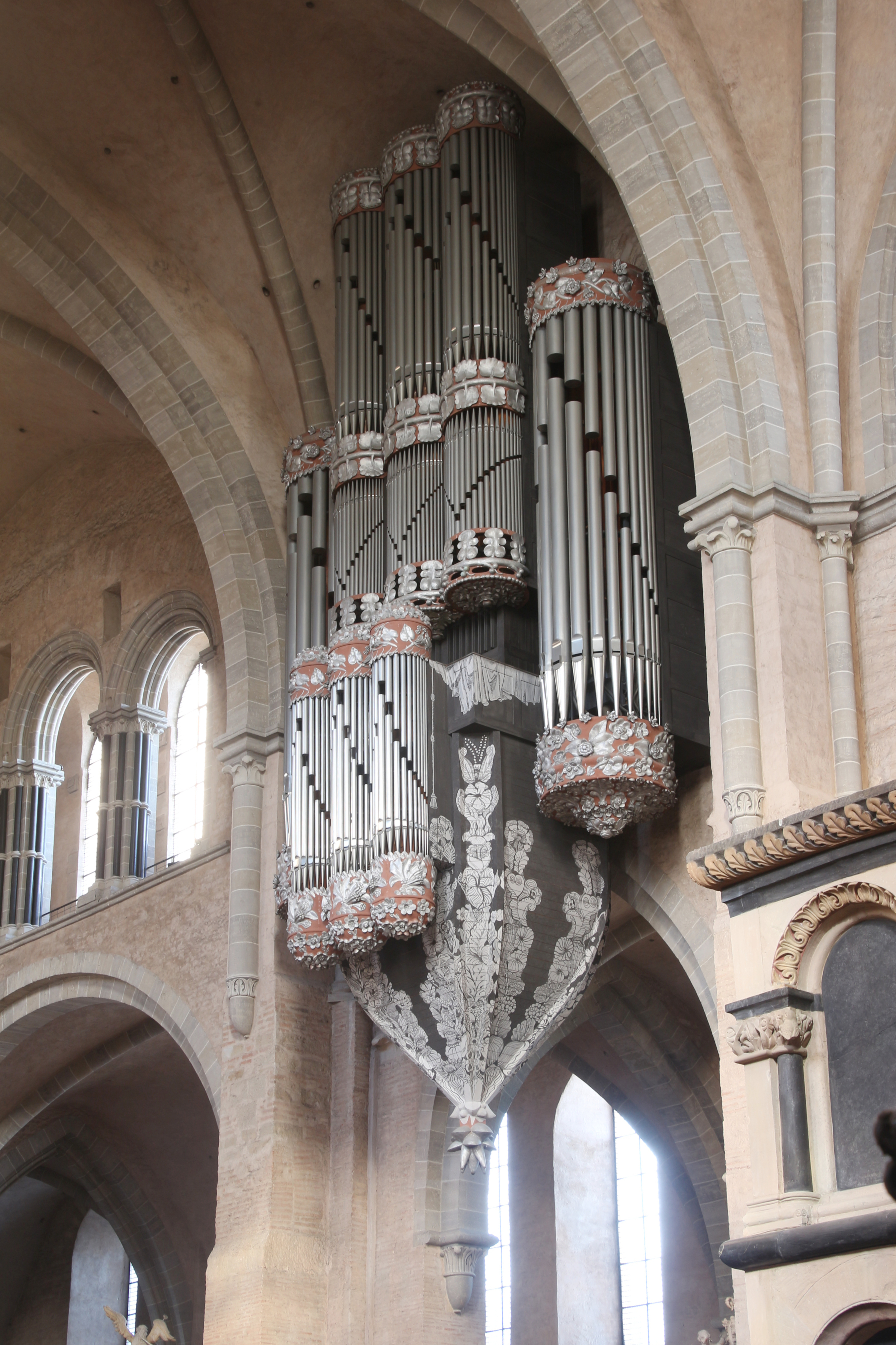 Orgel